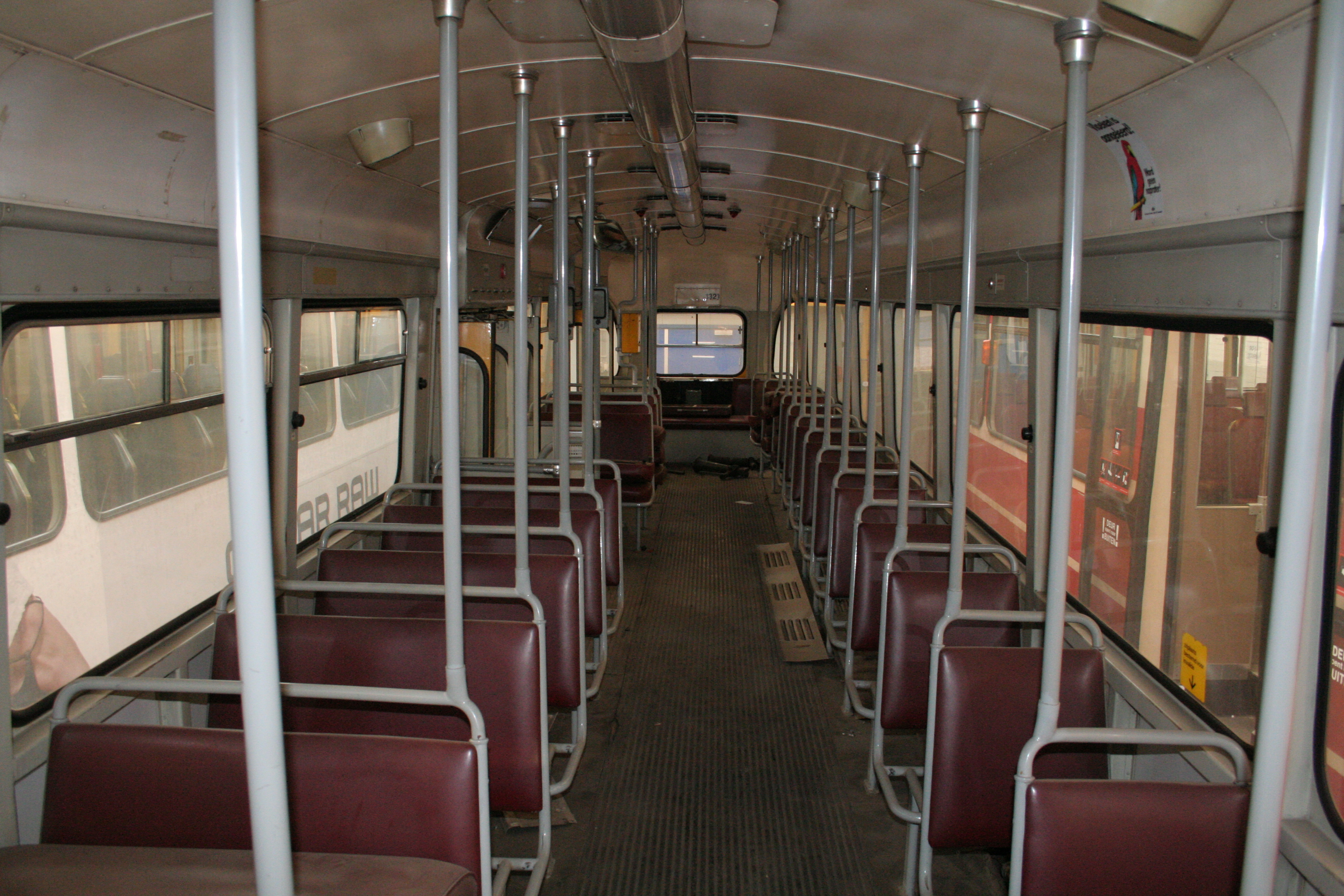 Tram interior van een PCC tram in Den Haag.